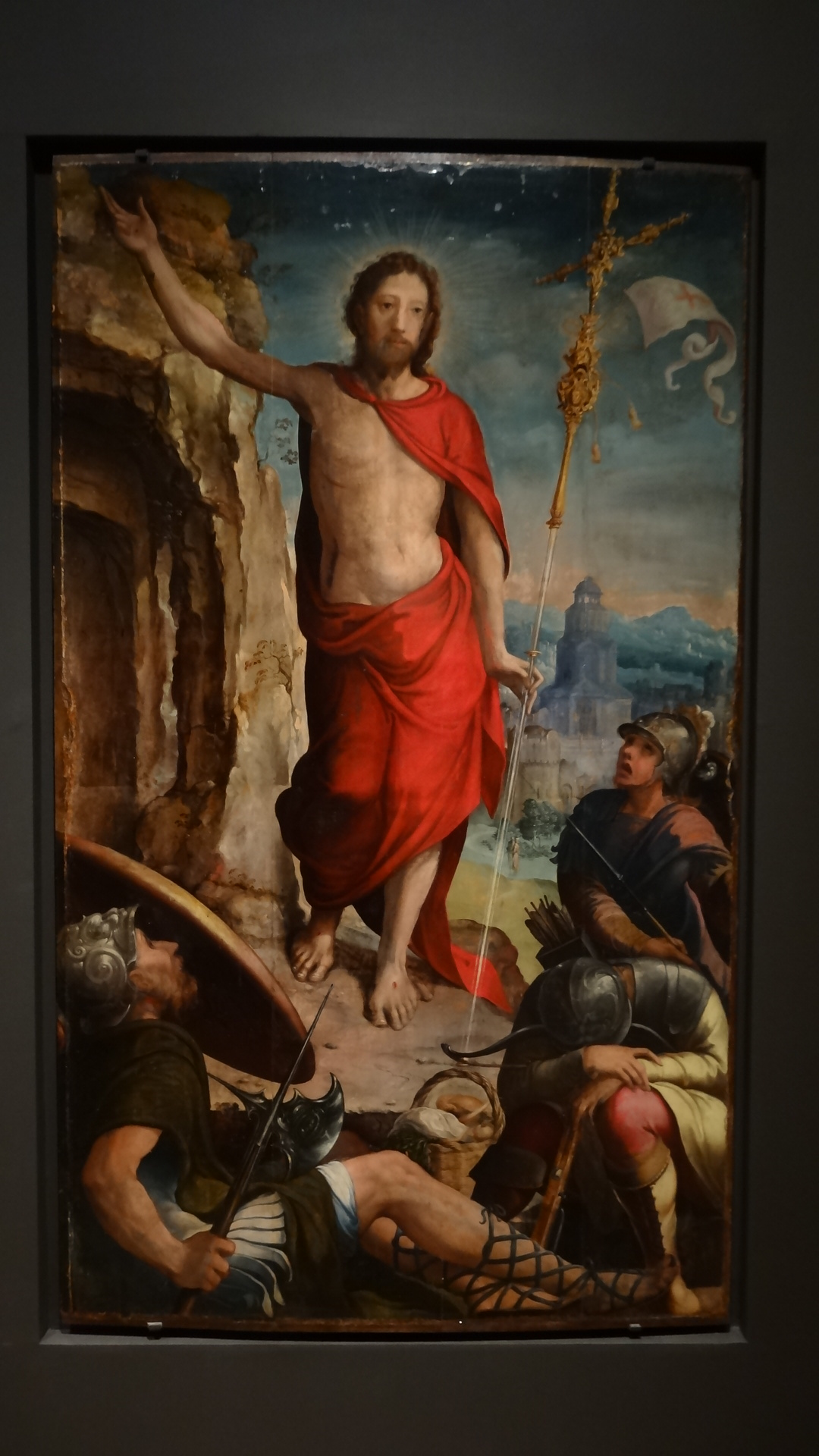 Ressurreição é uma pintura a óleo de c. 1550-60 pintado por oficina portuguesa para o Retábulo da Matriz de Santa Cruz, na ilha da Madeira.